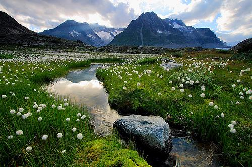 Near Marjelensee, Bernese Alps